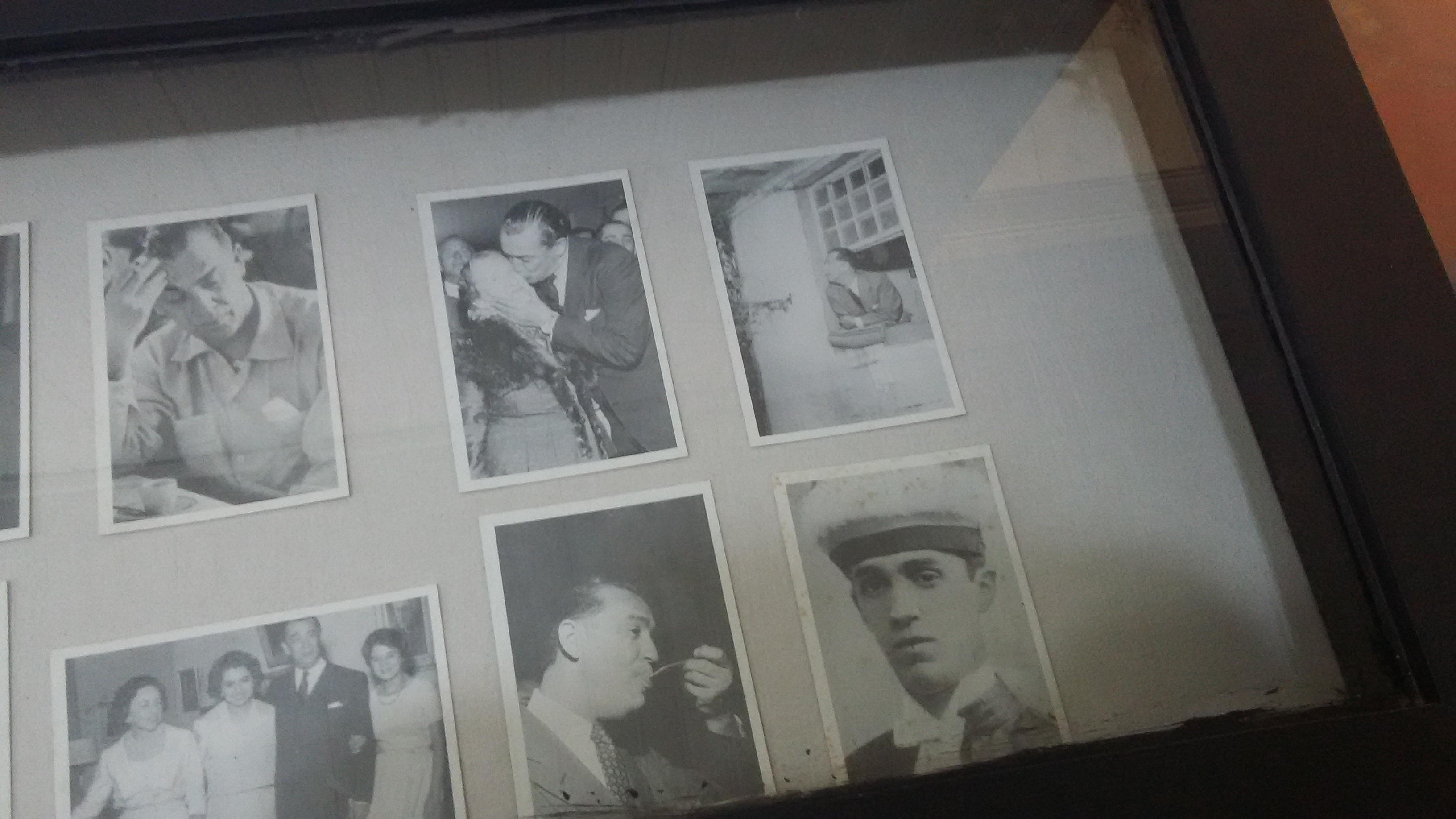 hay fotos antiguas del Presidente